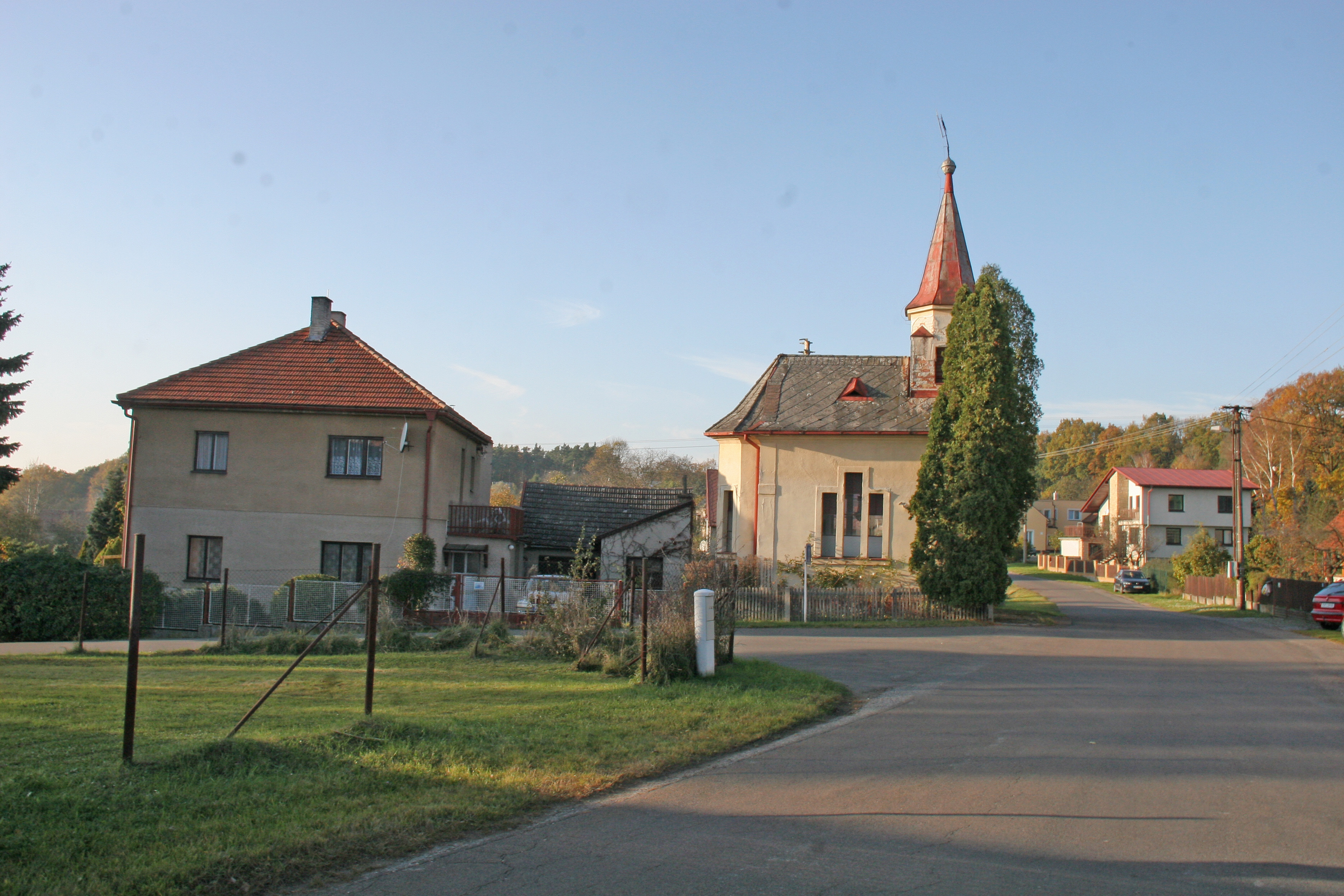 Koudelka kaple